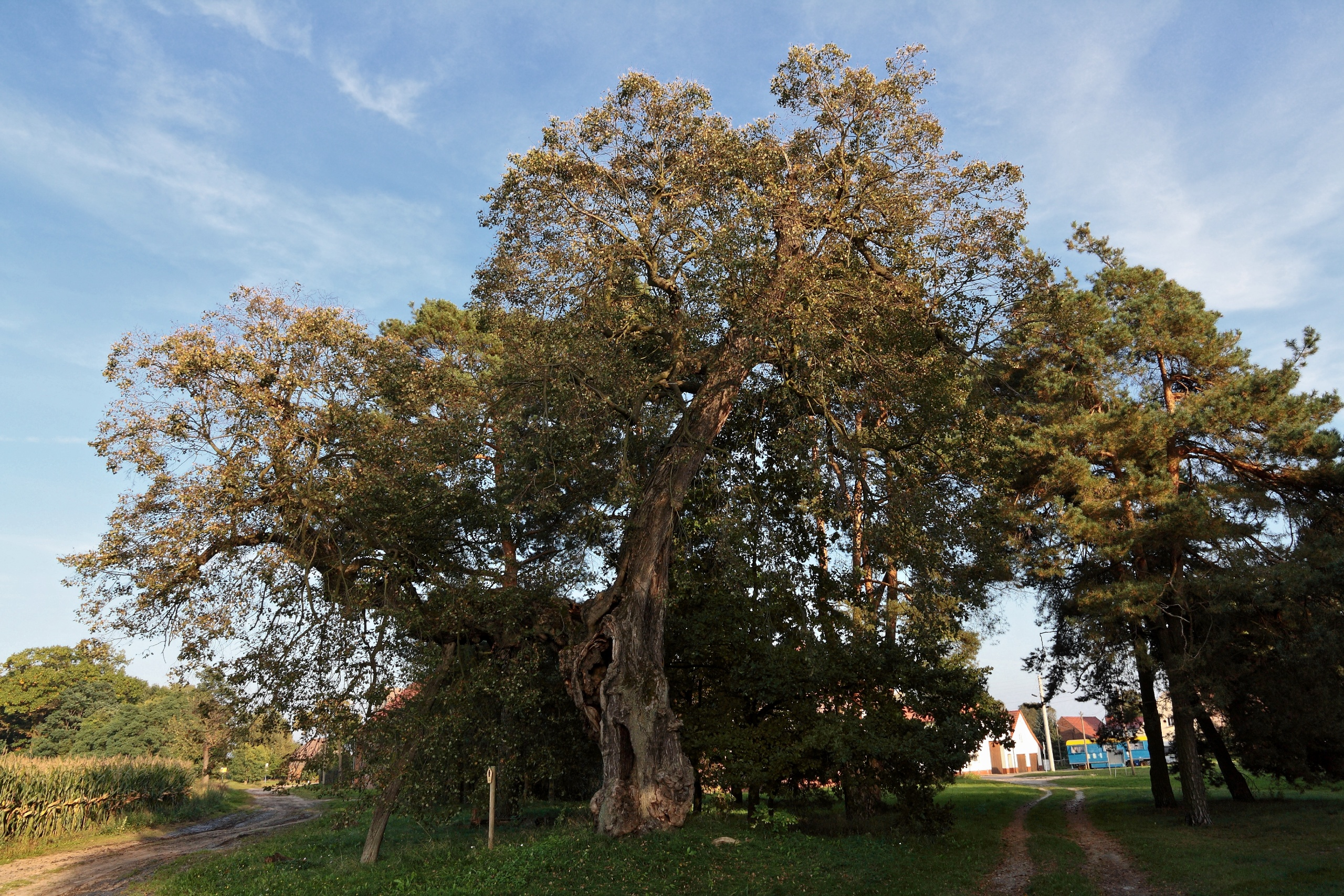 800-jährige Winterlinde in Hohenkuhnsdorf